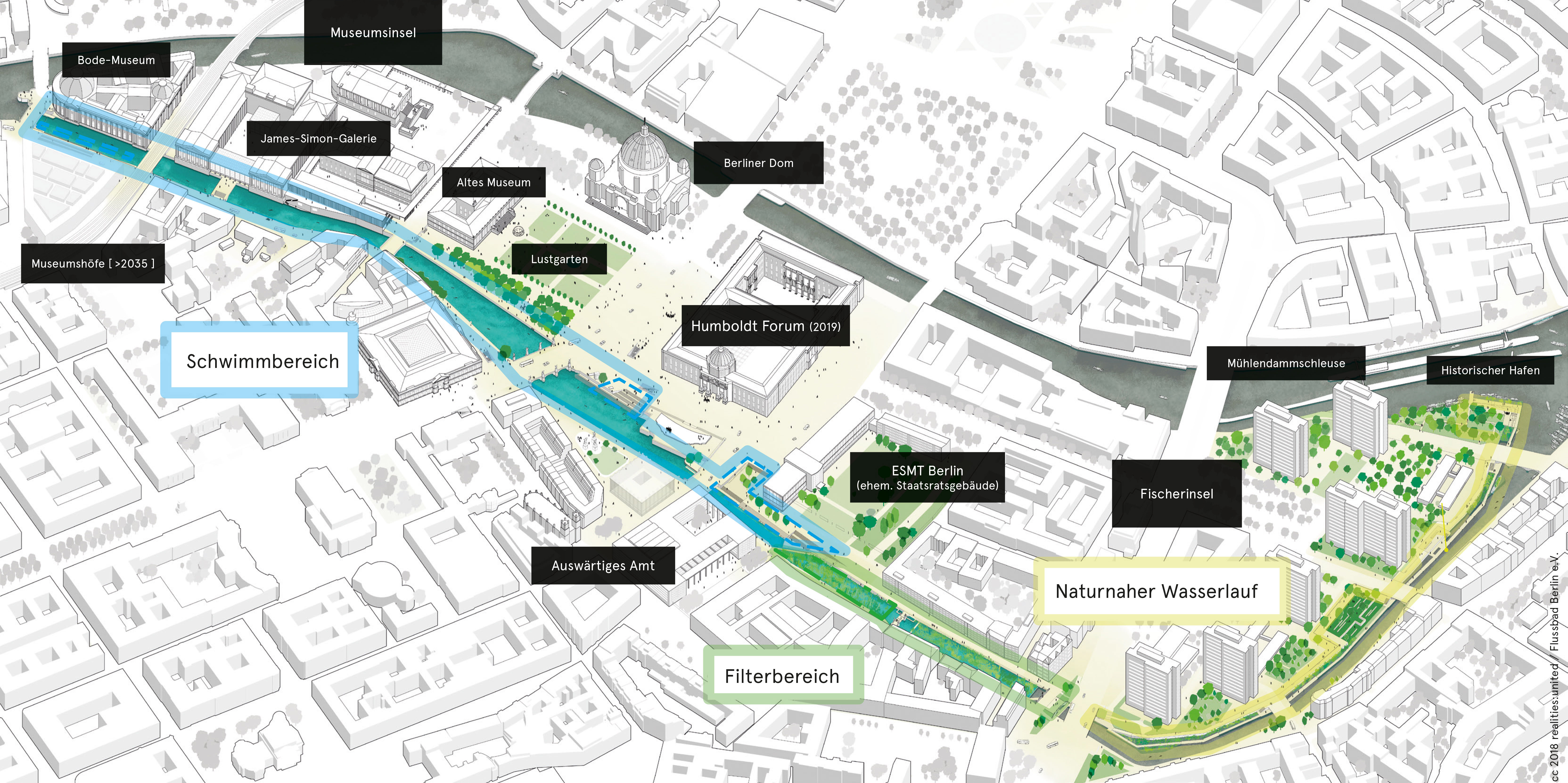 Projektdarstellung nach Vorgabe der Senatsverwaltung für Stadtentwicklung und Wohnen. Der Verein Flussbad Berlin vertritt noch andere Konzeptvarianten.